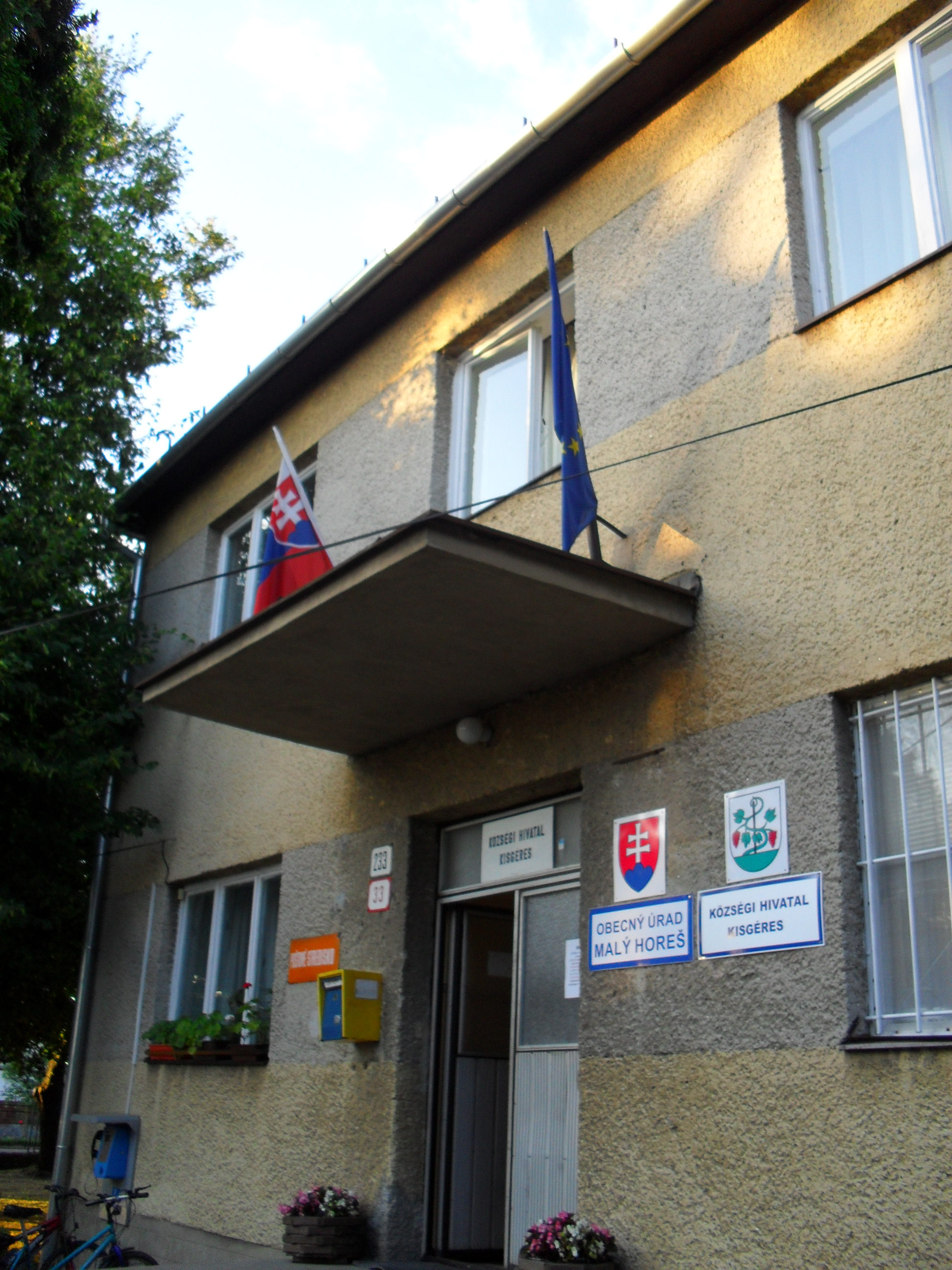 Kisgéres - községi hivatal